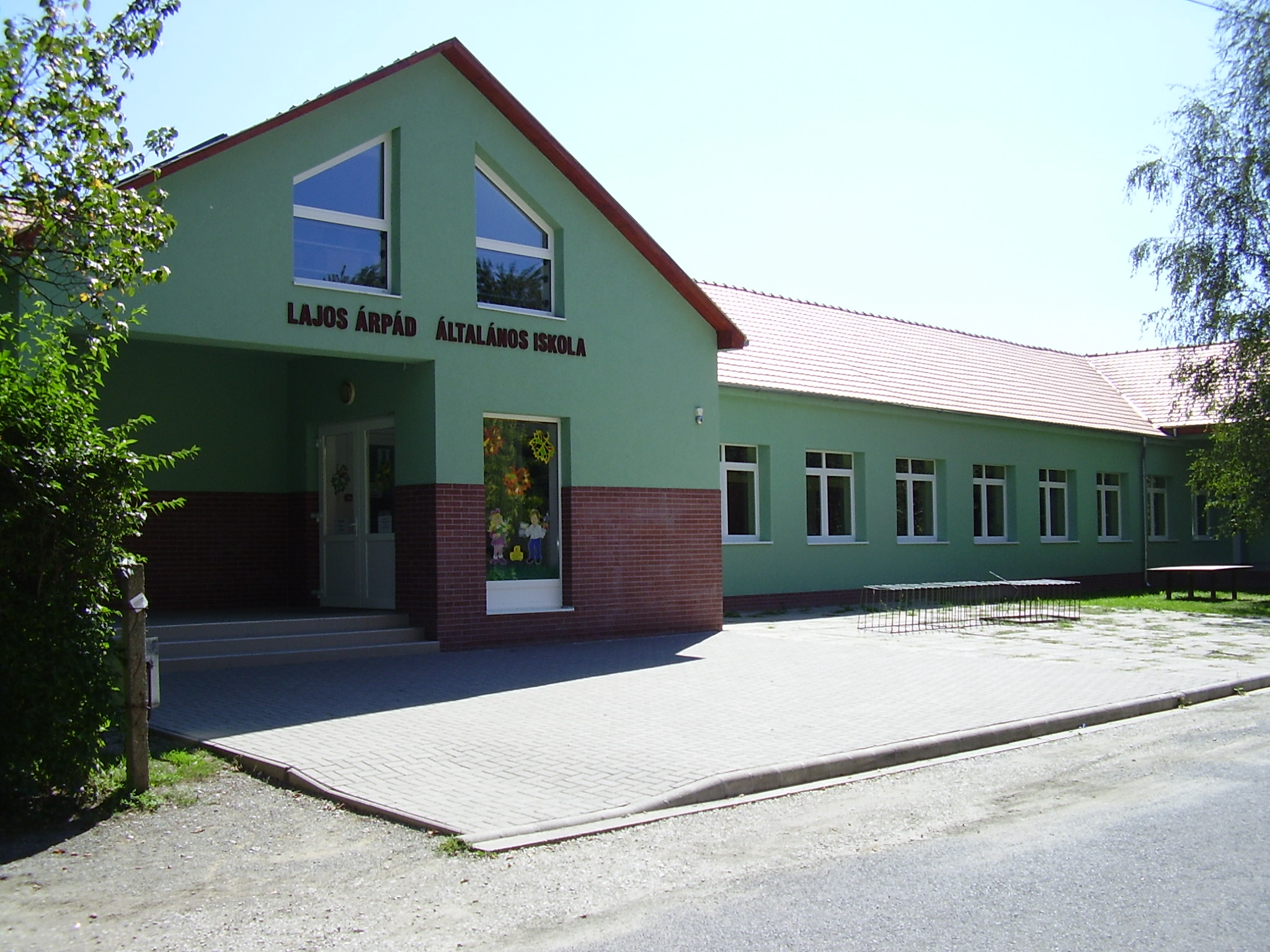 Lajos Árpád Általános Iskola (Dédestapolcsány, Borsod-Abaúj-Zemplén megye, Magyarország)